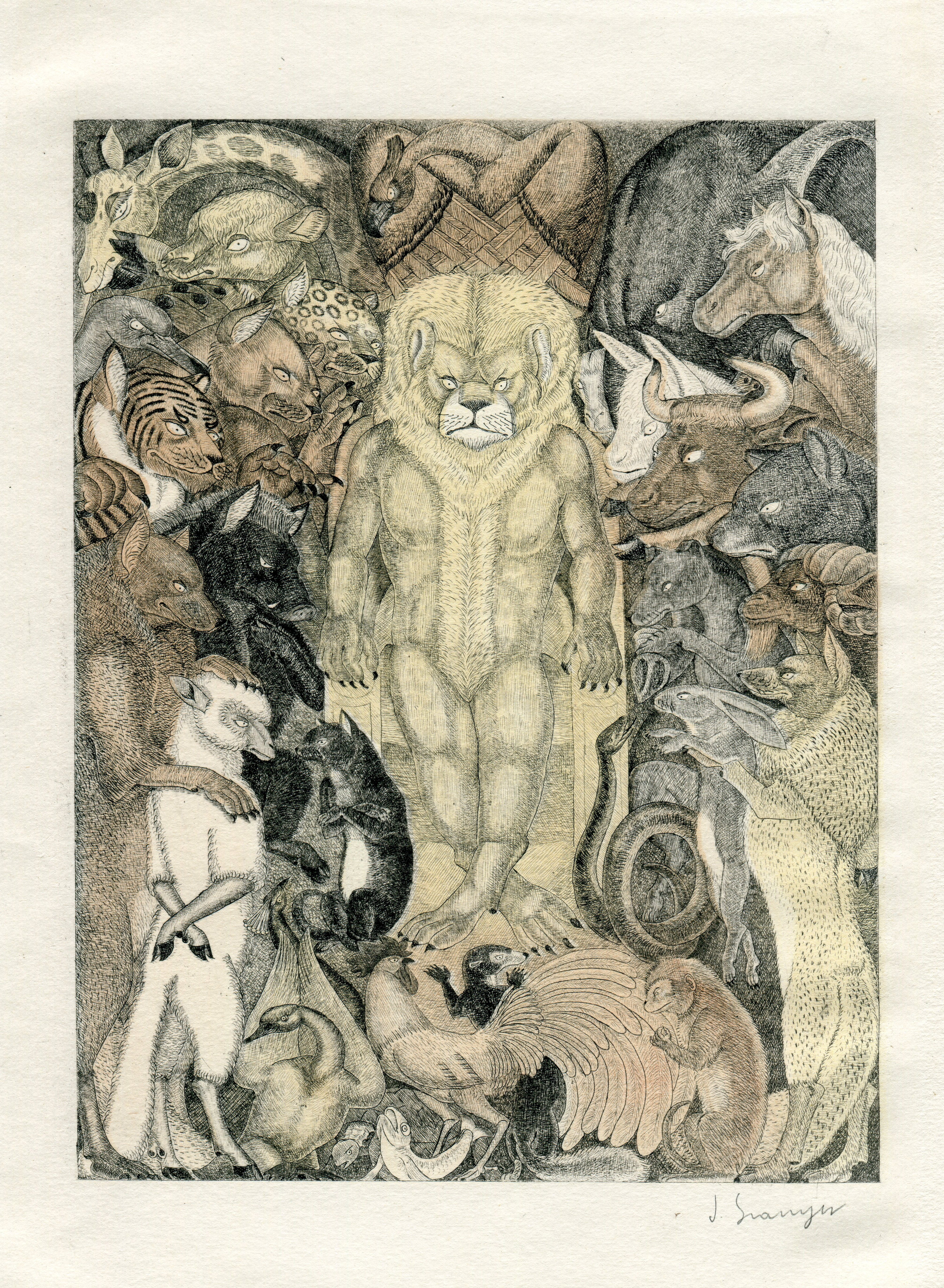 Il·lustració de J. Granyer la versión catalana de Joan Oliver d'El Llibre de les Bèsties de Ramon Llull